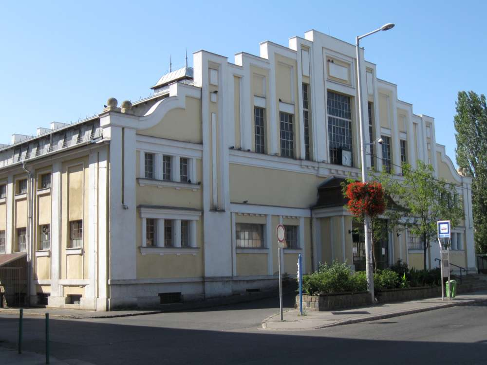 Tátra téri vásárcsarnok (Az 1920-as években épült, műemlék jellegű) Budapest, XX. ker. Kossuth Lajos utca 82. és 84. között